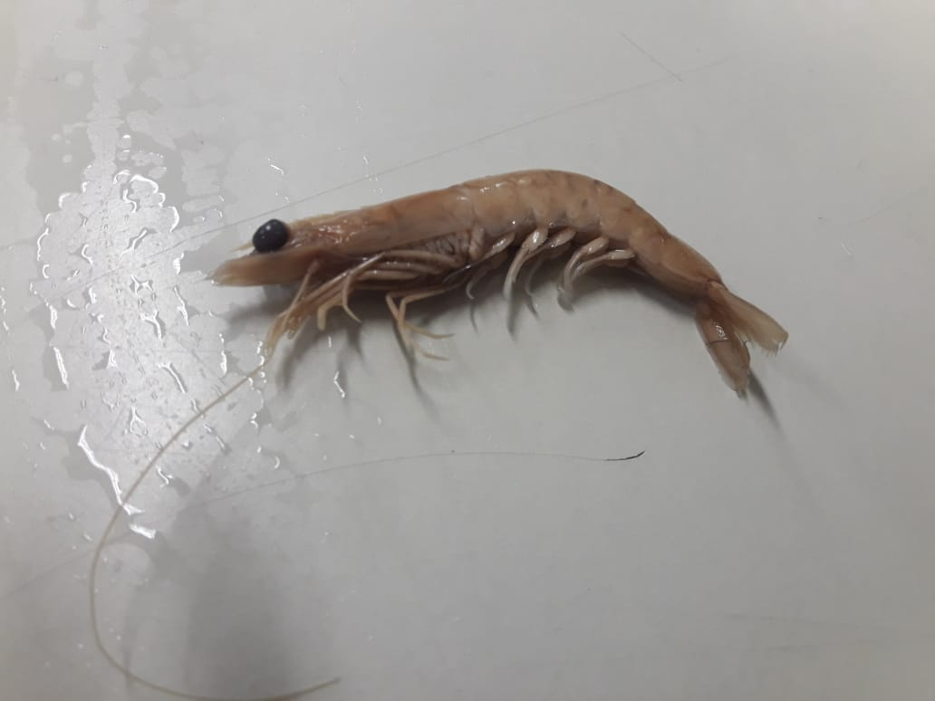 A imagem apresenta um camarão peneídeo em vista lateral comumente chamado de camarão rosa, representante da classe malacostraca de crustáceos, da ordem Decapoda e família Penacoidea. A foto fooi tirada no laboratório de microscopia da Universidade de São Paulo.